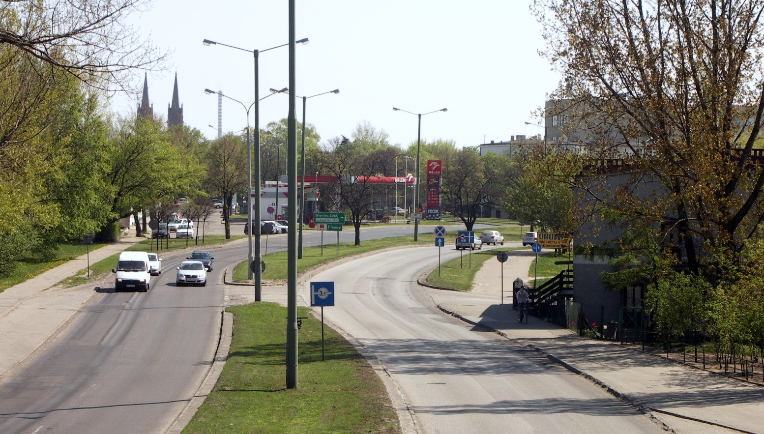 Zazamcze